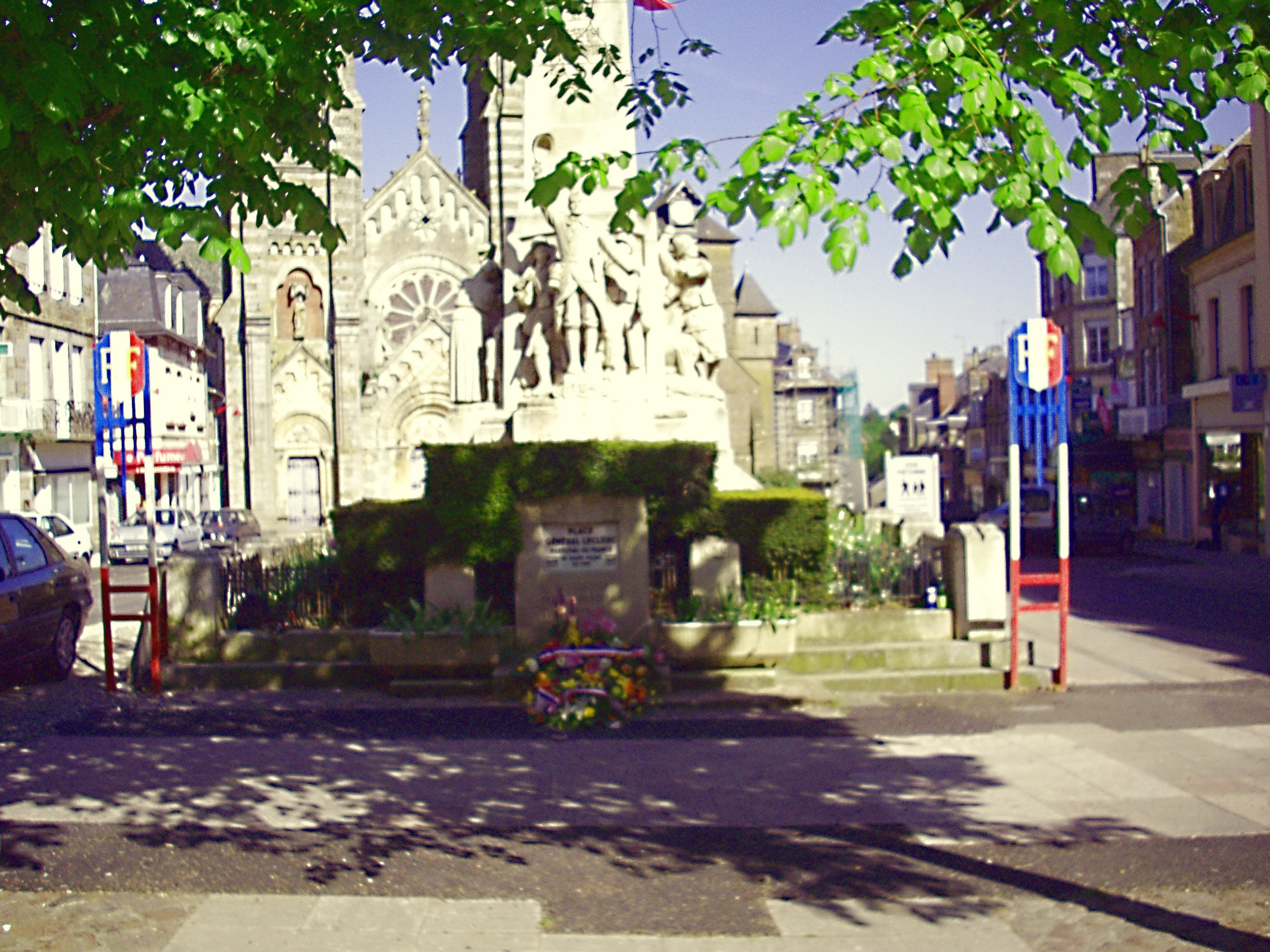 Monument aux Morts, La Ferté-Macé, Basse-Normandie